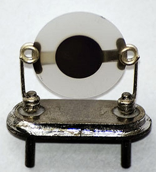 Quarzhalter